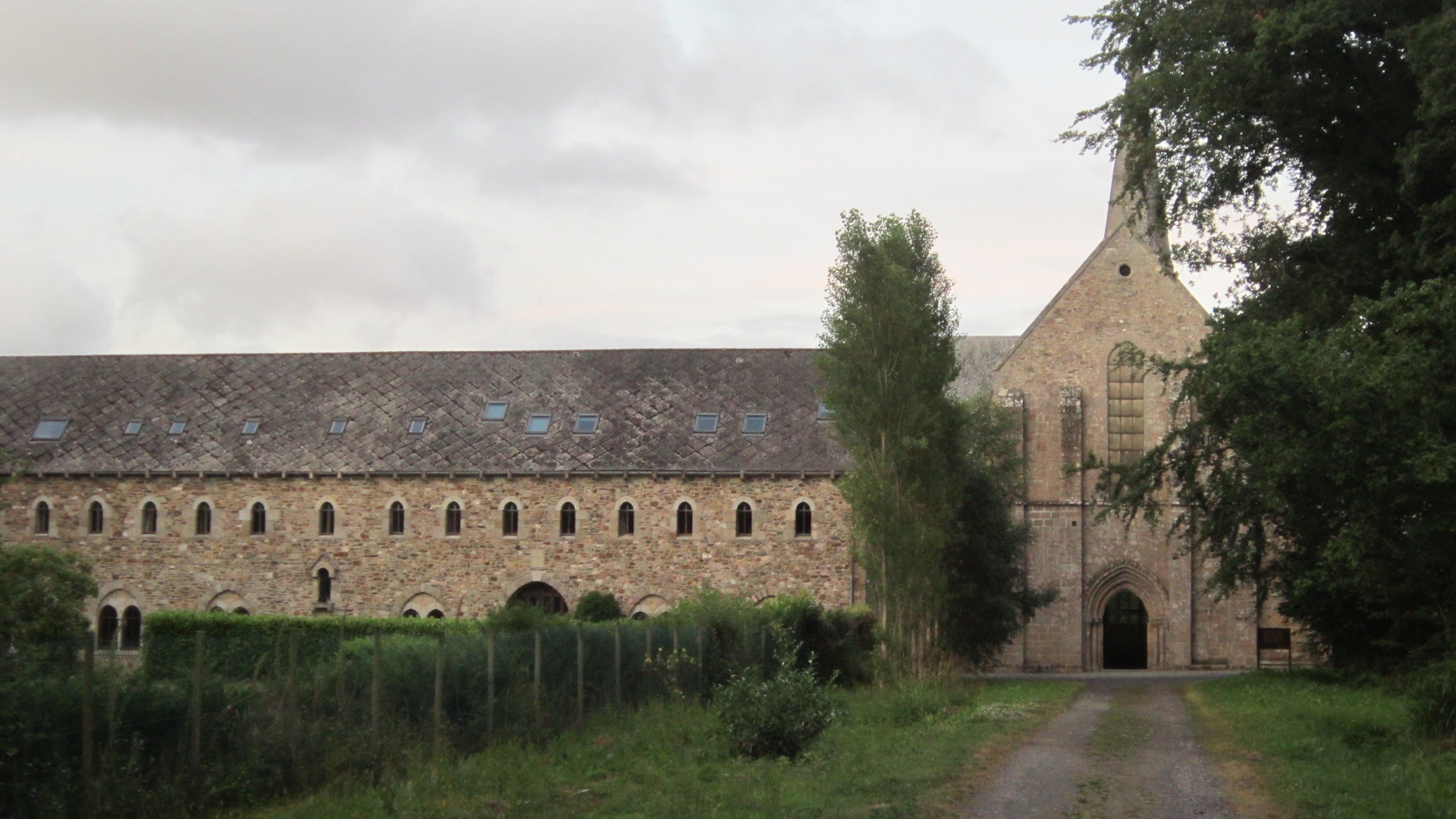 Bâtiment des moines et église abbatiale de l'abbaye cistercienne de Boquen, dans les Côtes-d'Armor